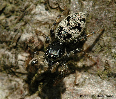 Salticus cingulatus (Da: Skovzebraedderkop), Vinderup, Denmark